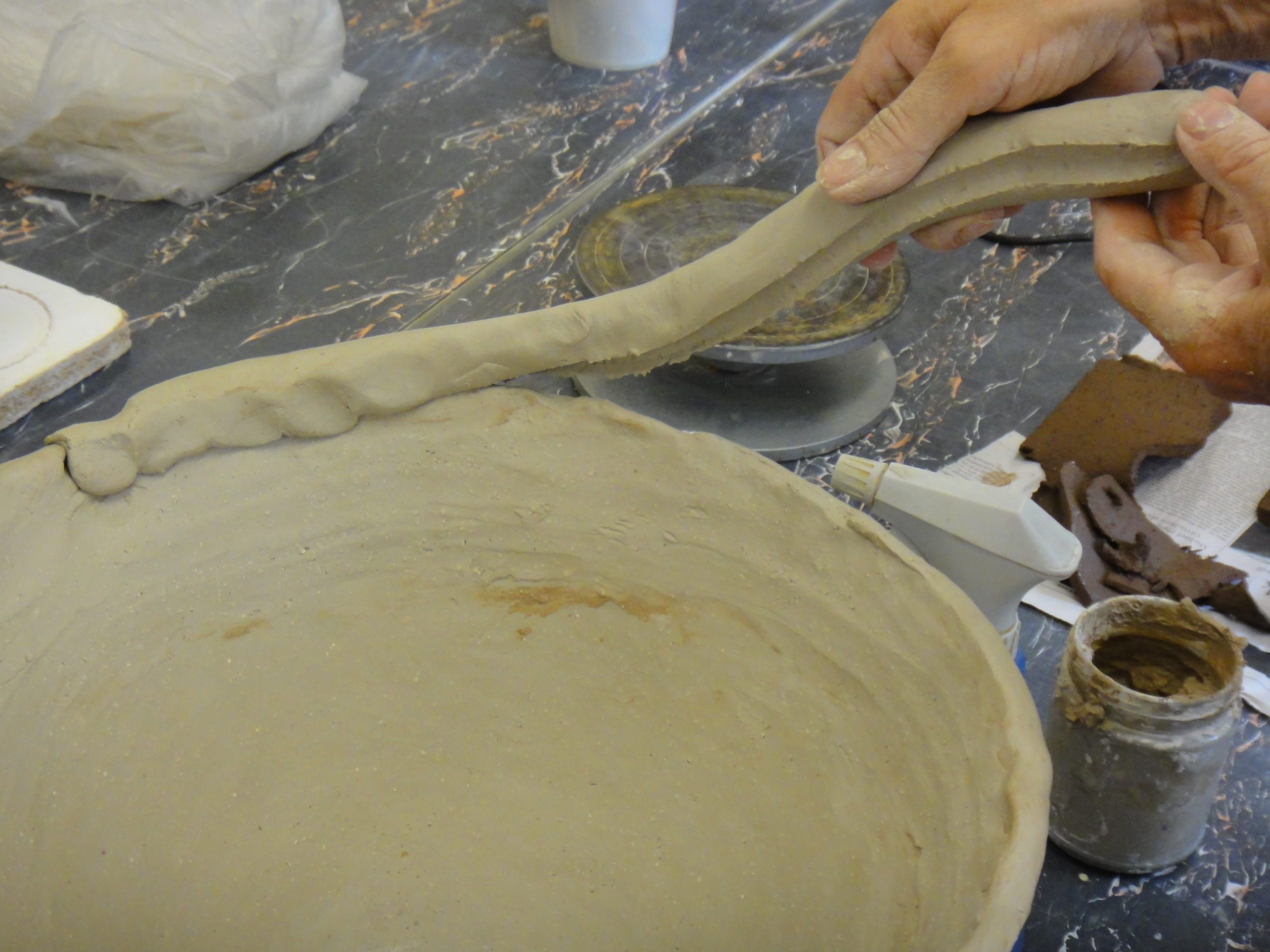 Herstellung einer Schale aus Steinzeugmasse, grob schamottiert, in Wulsttechnik, Aufsetzen des Wulstes